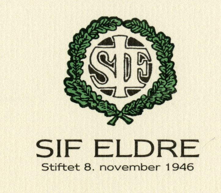 Logo til SIF Eldre